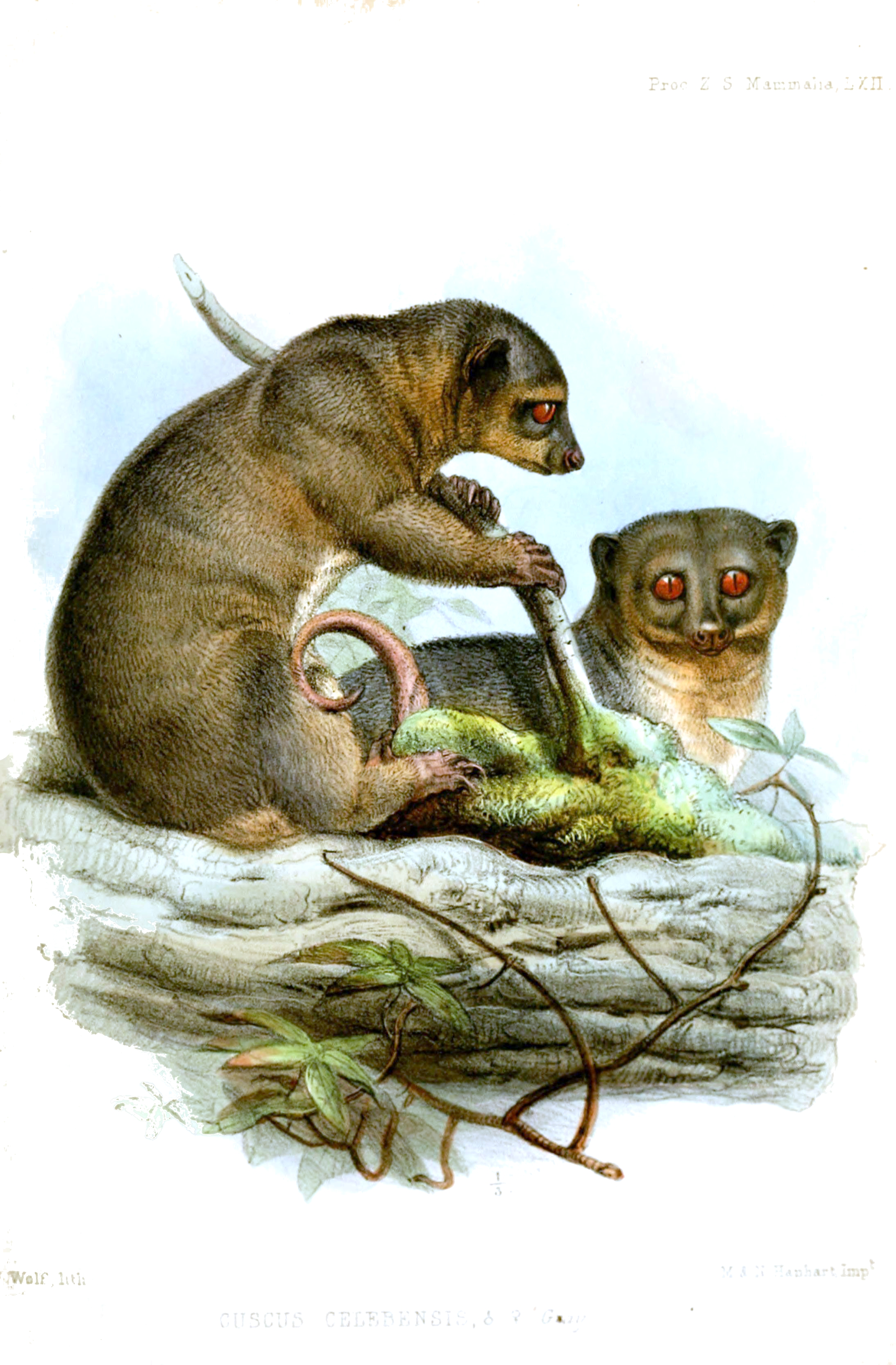 Cuscus celebensis=Strigocuscus celebensis